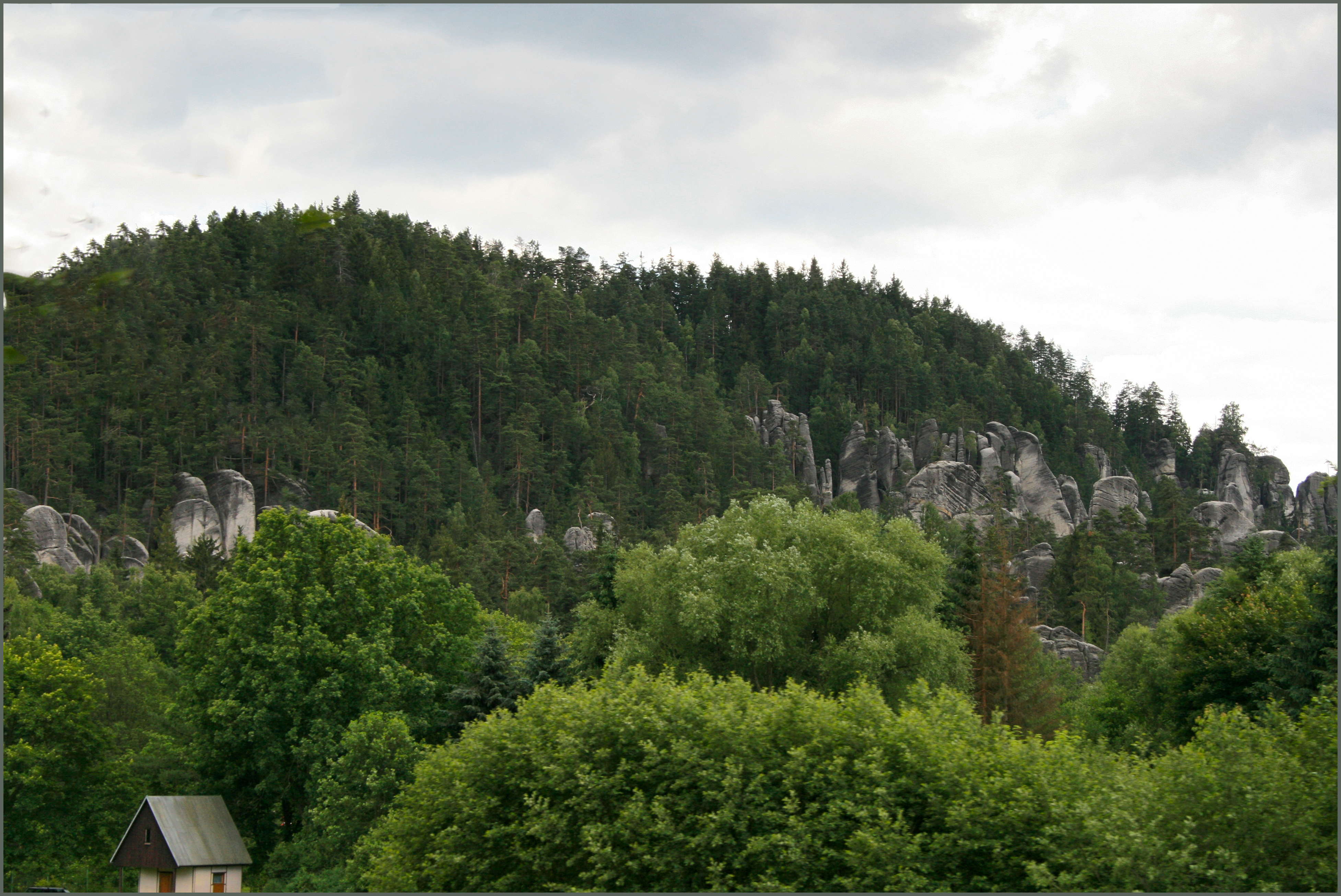 Dolní Adršpach